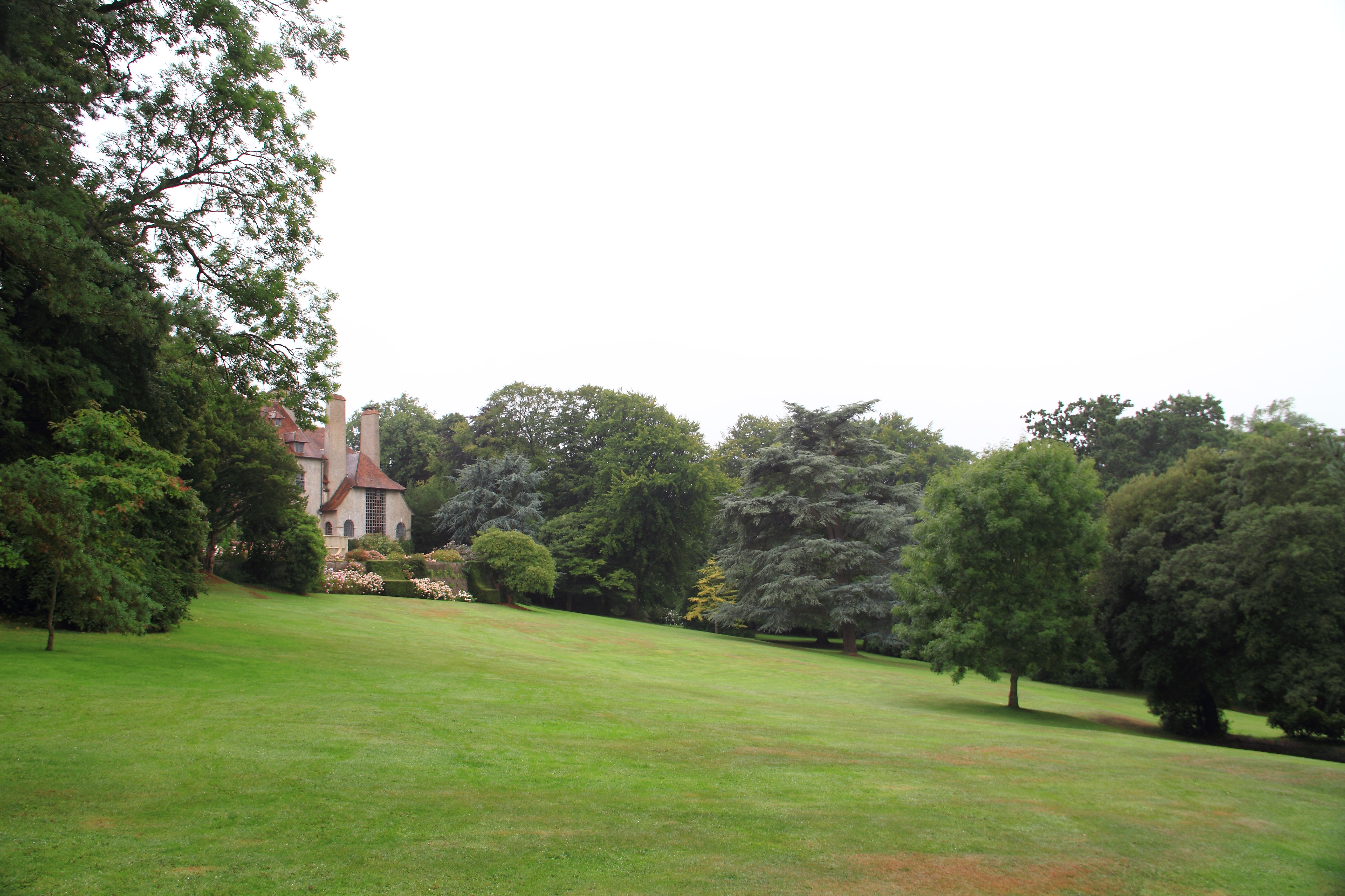 Im Park Bois des Moutiers in Varengeville-sur-Mer im Sommer 2017.